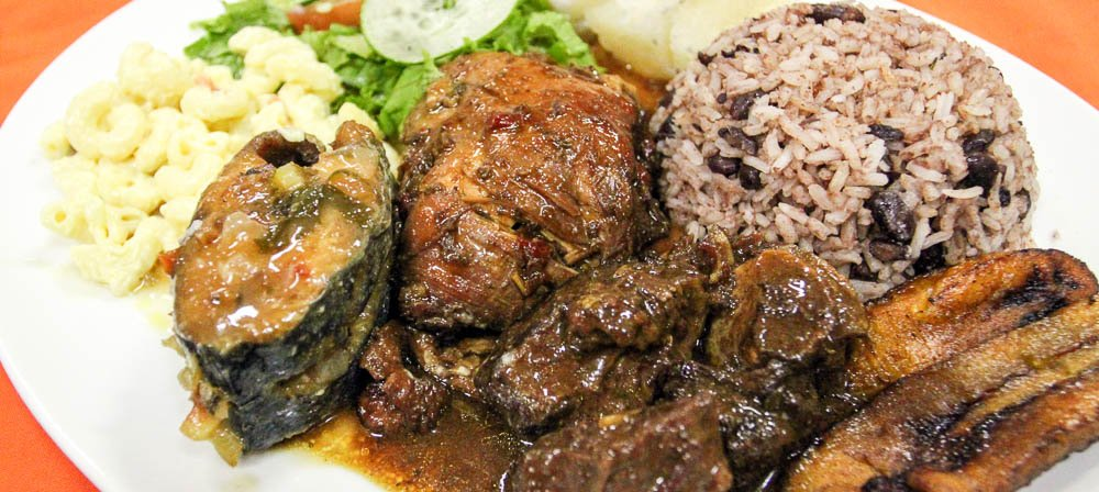 Receta de Rice and beans